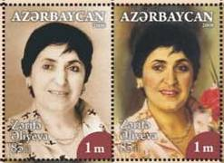 Azeri postage stamp